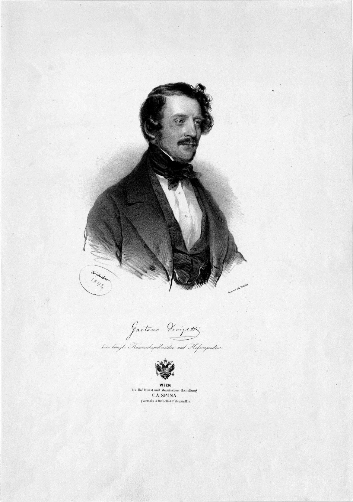 Gaetano Donizetti, Lithographie von Josef Kriehuber, 1842